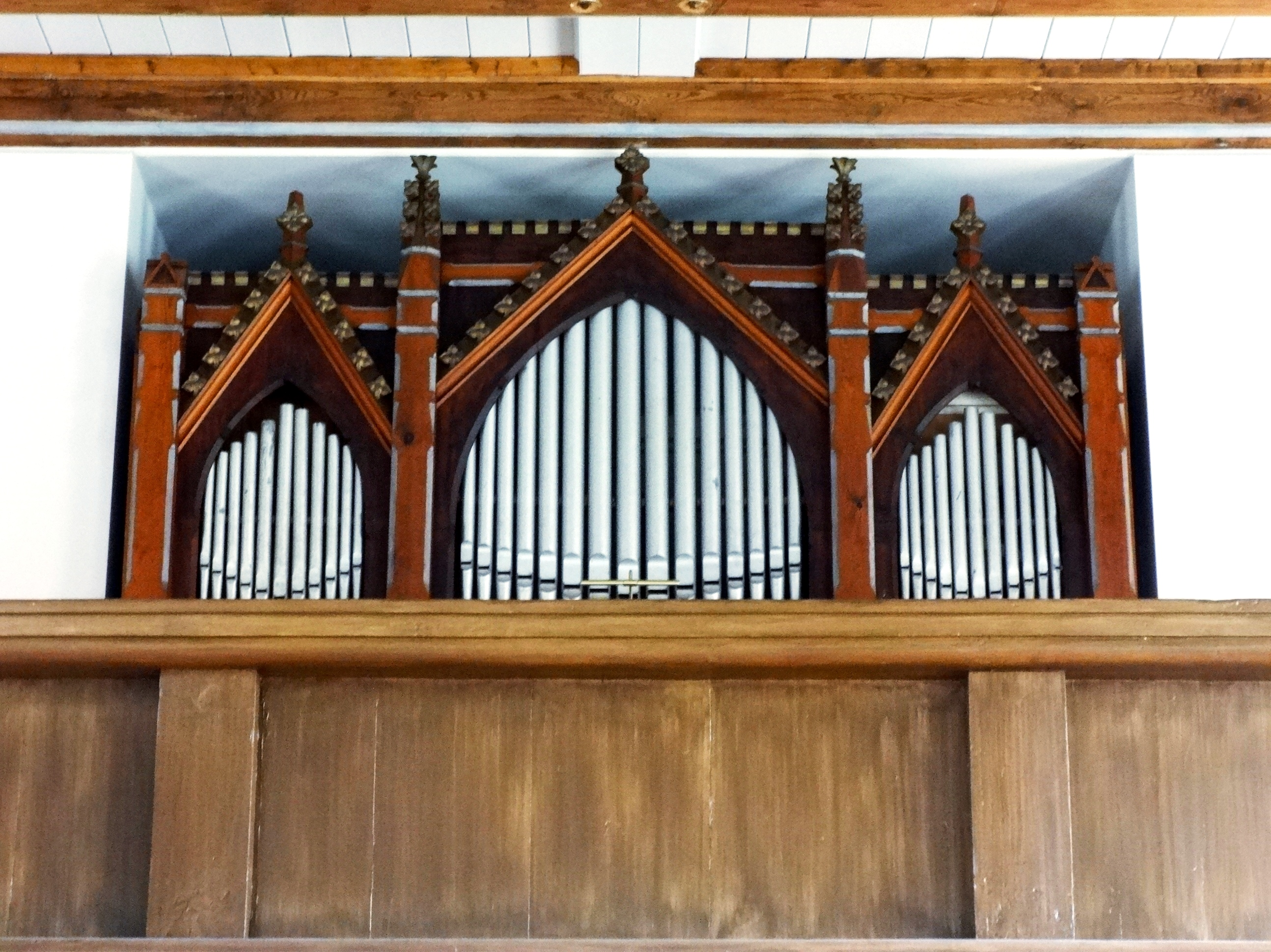 Die Dorfkirche Rieben wurde im Stil der romanischen Neugotik in den Jahren 1817 bis 1820 errichtet. Im Jahr 1896 erweitere die Kirchengemeinde die Saalkirche und schaffte eine Orgel an. Nachdem in den 1970er Jahren bei einer Sanierung ein Putz verwendet wurde, der das Bauwerk schädigte, sanierte die Gemeinde den Sakralbau in den Jahren 2006 bis 2012. Das Sanierungskonzept sah dabei sowohl eine kirchliche, wie auch kommunale und soziale Nutzung vor.